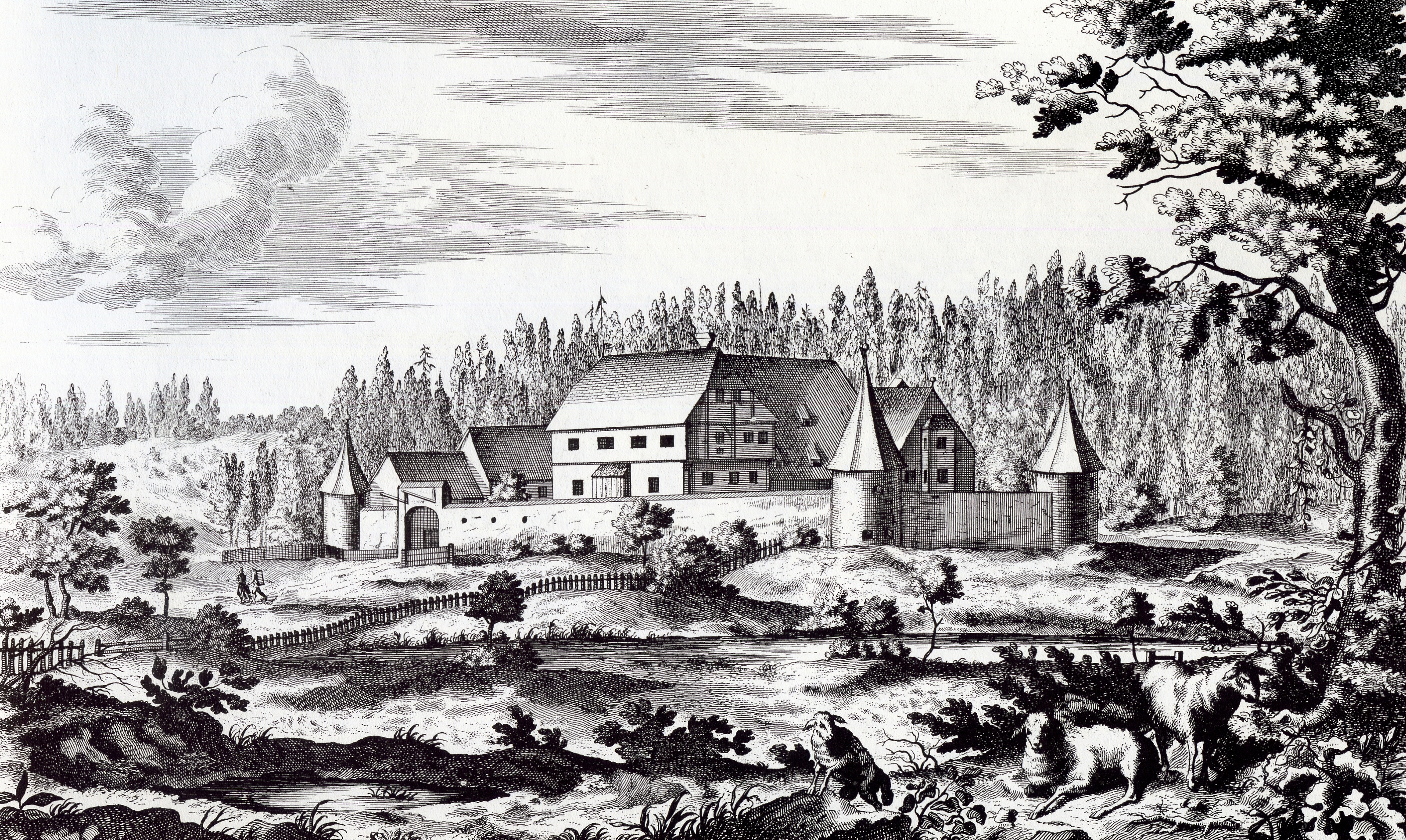 Schloss Grünenfurt um 1720. Kupferstich, gezeichnet von Christian Schumann, gedruckt bei Jeremias Wolff in Augsburg, 17,6 x 28,7 Zentimeter (cm). Vorgängerbau des heutigen Schlosses